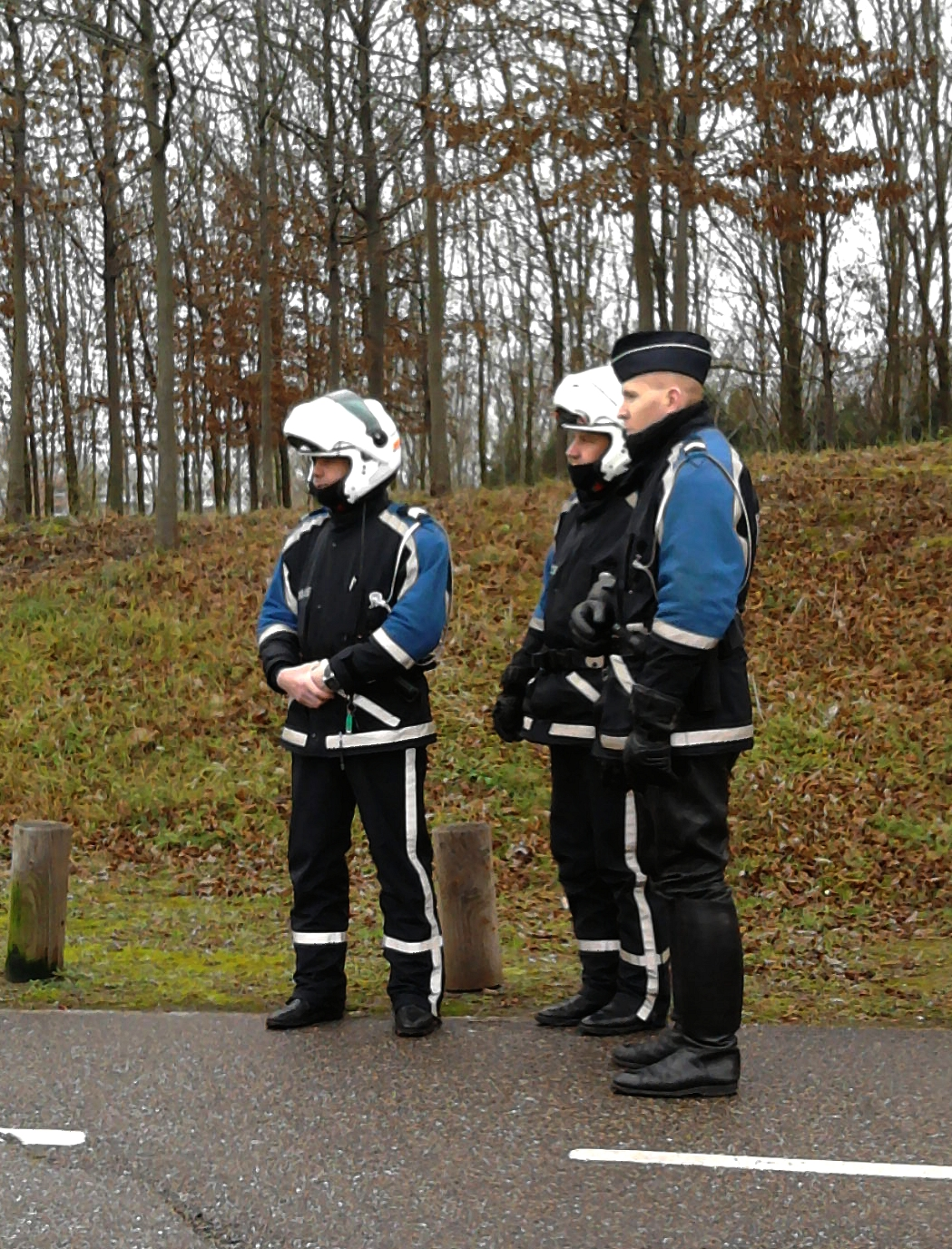 Manifestation des taxis le 10 janvier 2013, parc de l'Etoile à Strasbourg